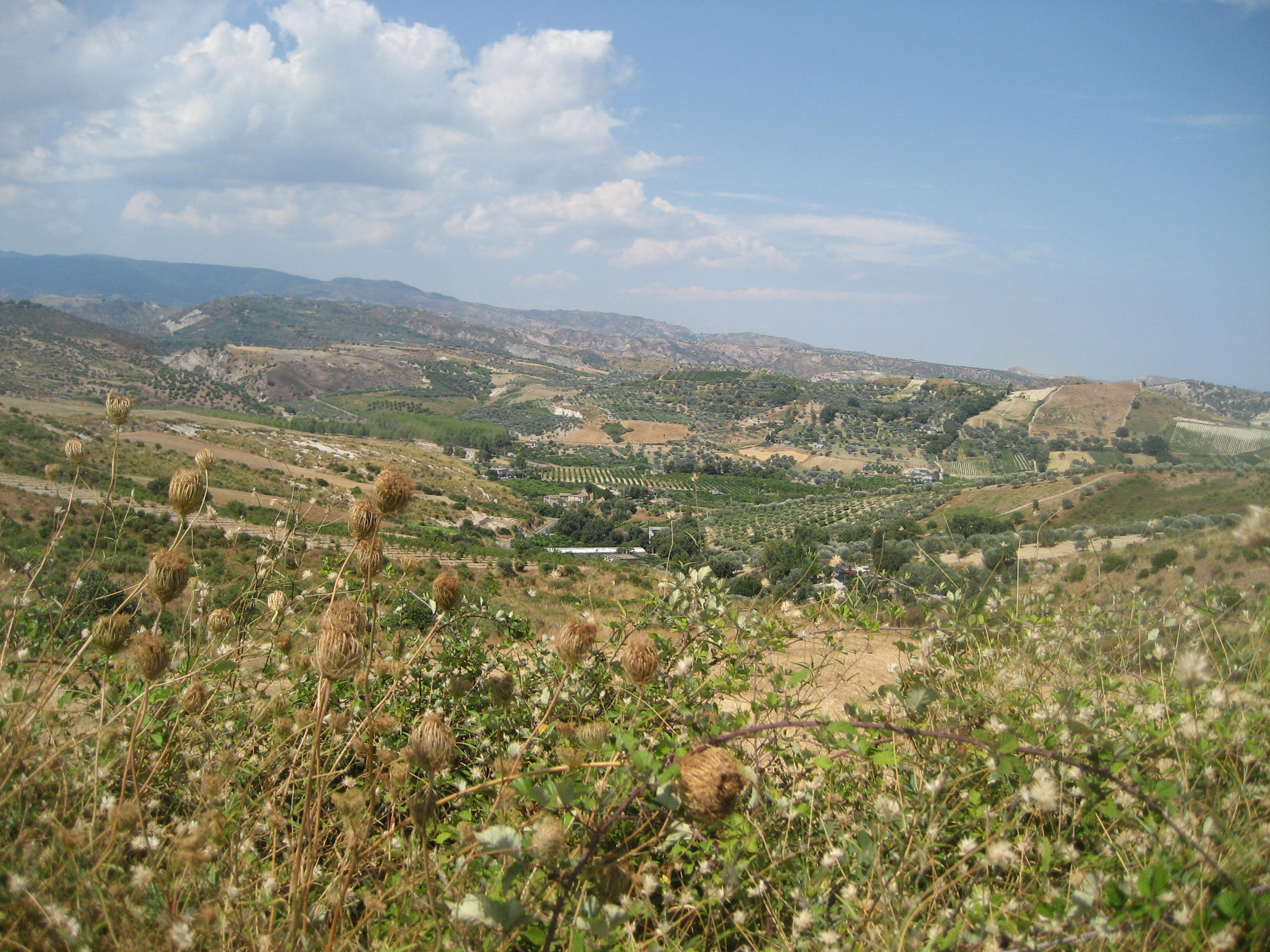 Vallata_STilaro dal basso